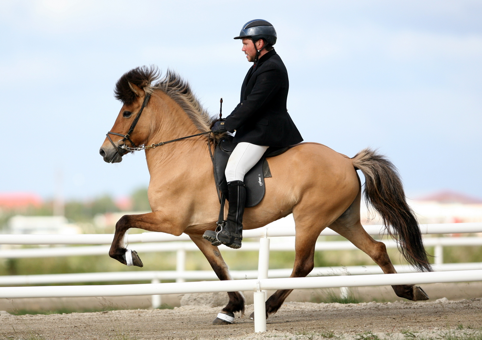 Bjarni Jónasson á Kommu frá Garði